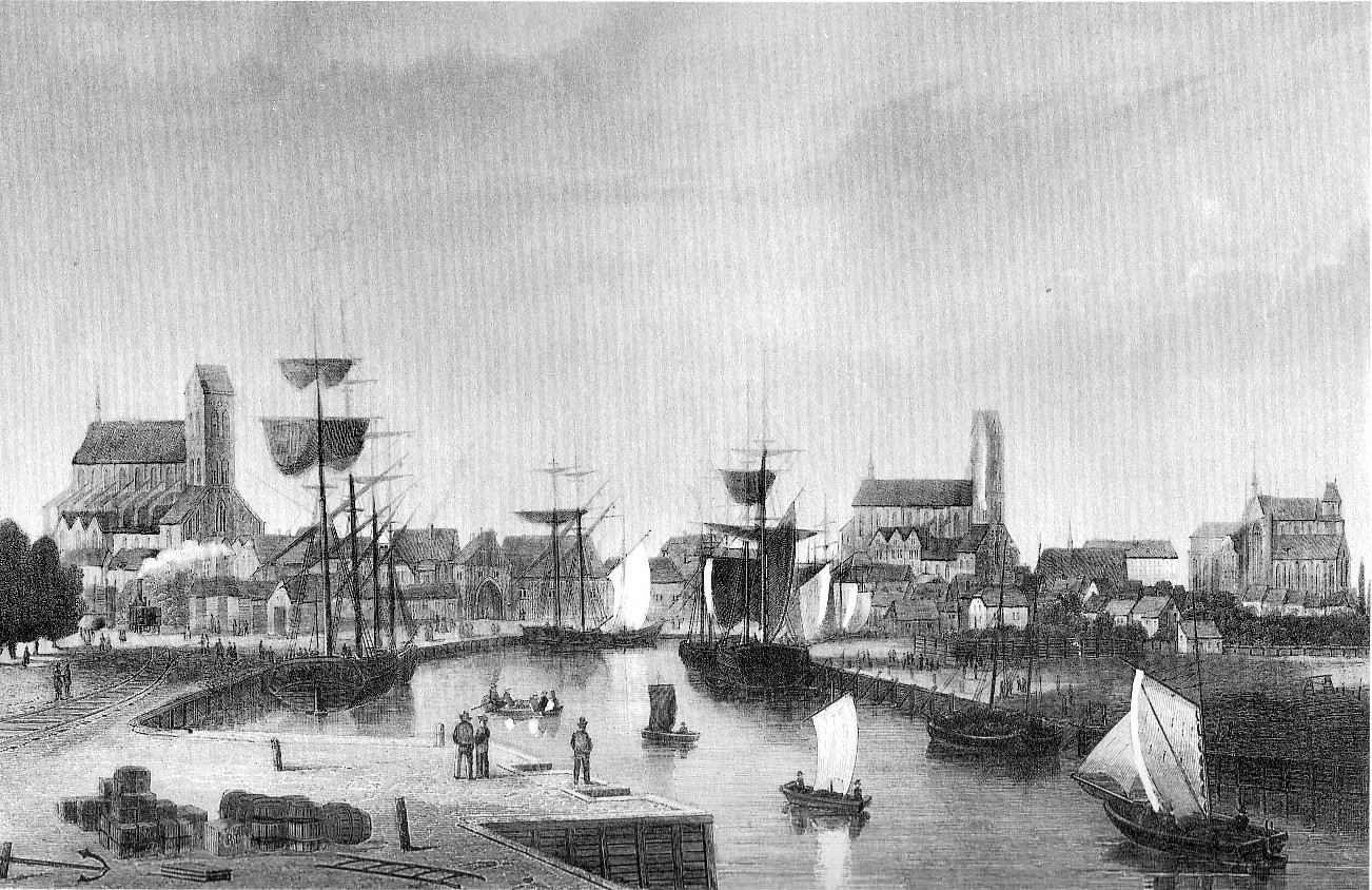 Historische Ansicht von Wismar in Mecklenburg-Vorpommern. Stahlstich.